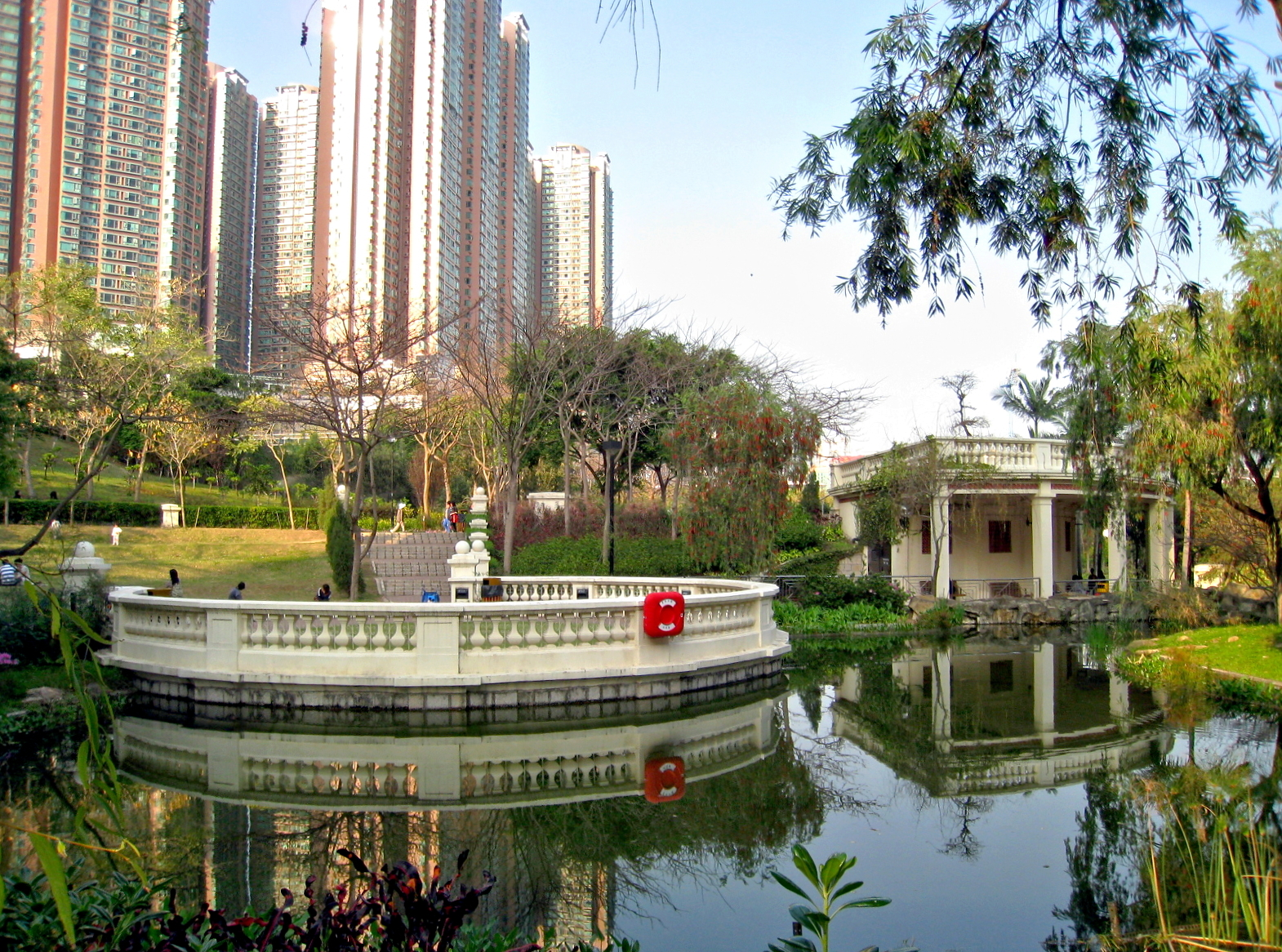 HK Tsing Yi Park Ornamental Lake